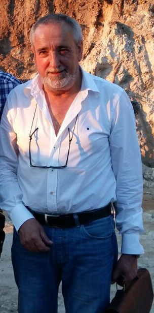 Pablo Rubén Eyré na Insua dos Poetas o 16 de xullo de 2016